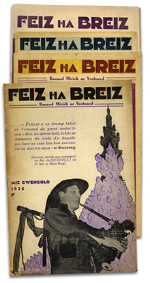 Revue en langue bretonne.